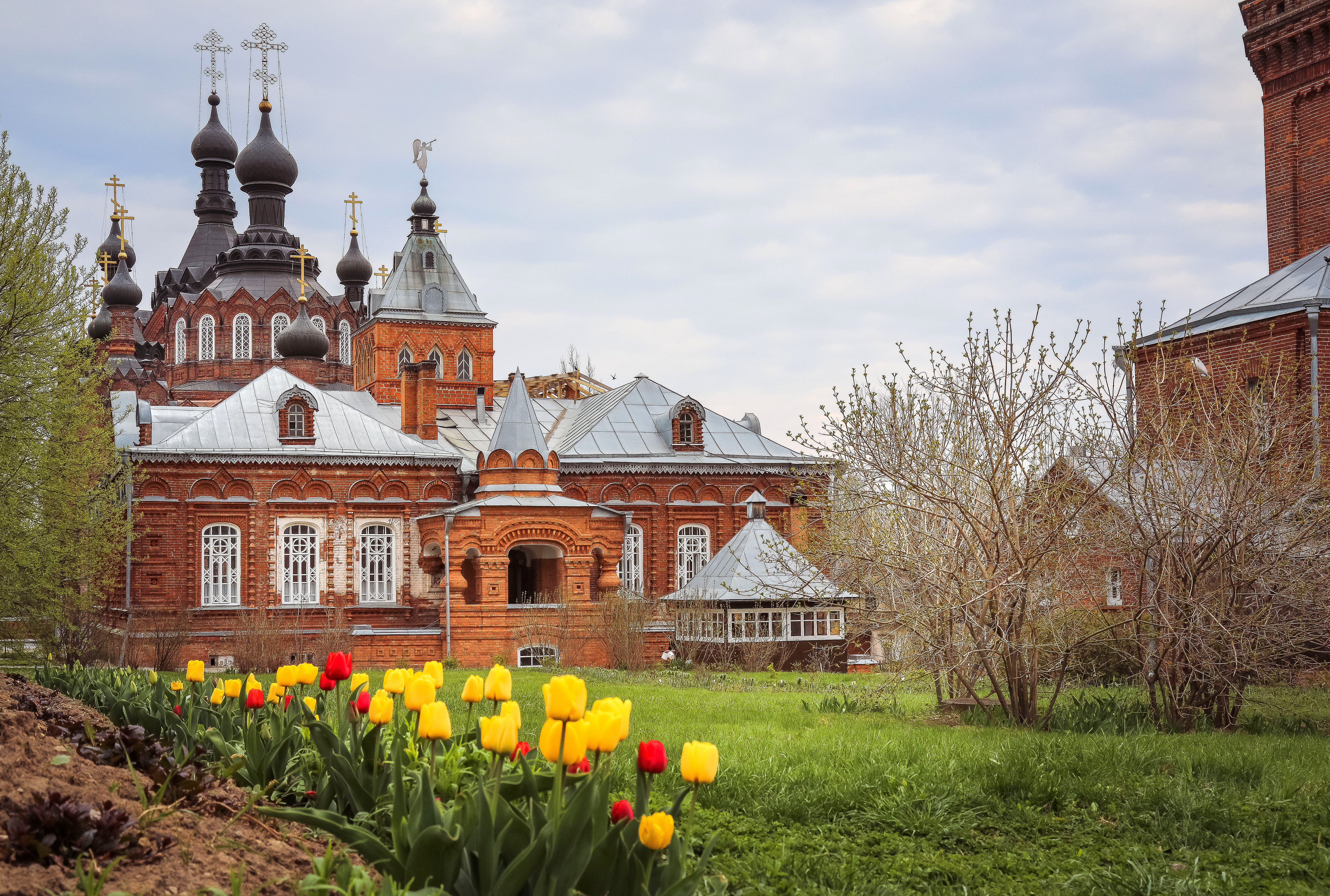 Казанская Амвросиевская ставропигиальная женская пустынь. Шамордино, Калужская область.